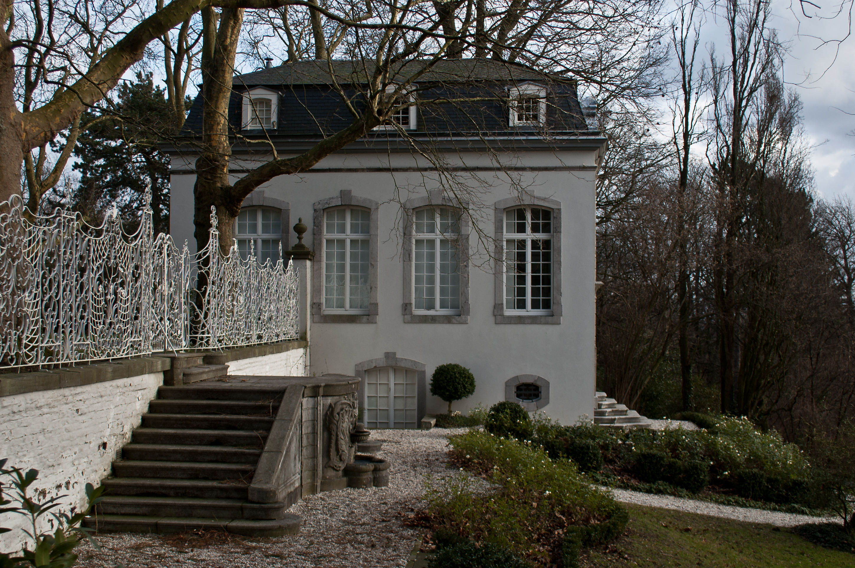 Der auf den Lousberg translozierte Kerstensche Pavillon, Entwurf durch Johann Josef Couven